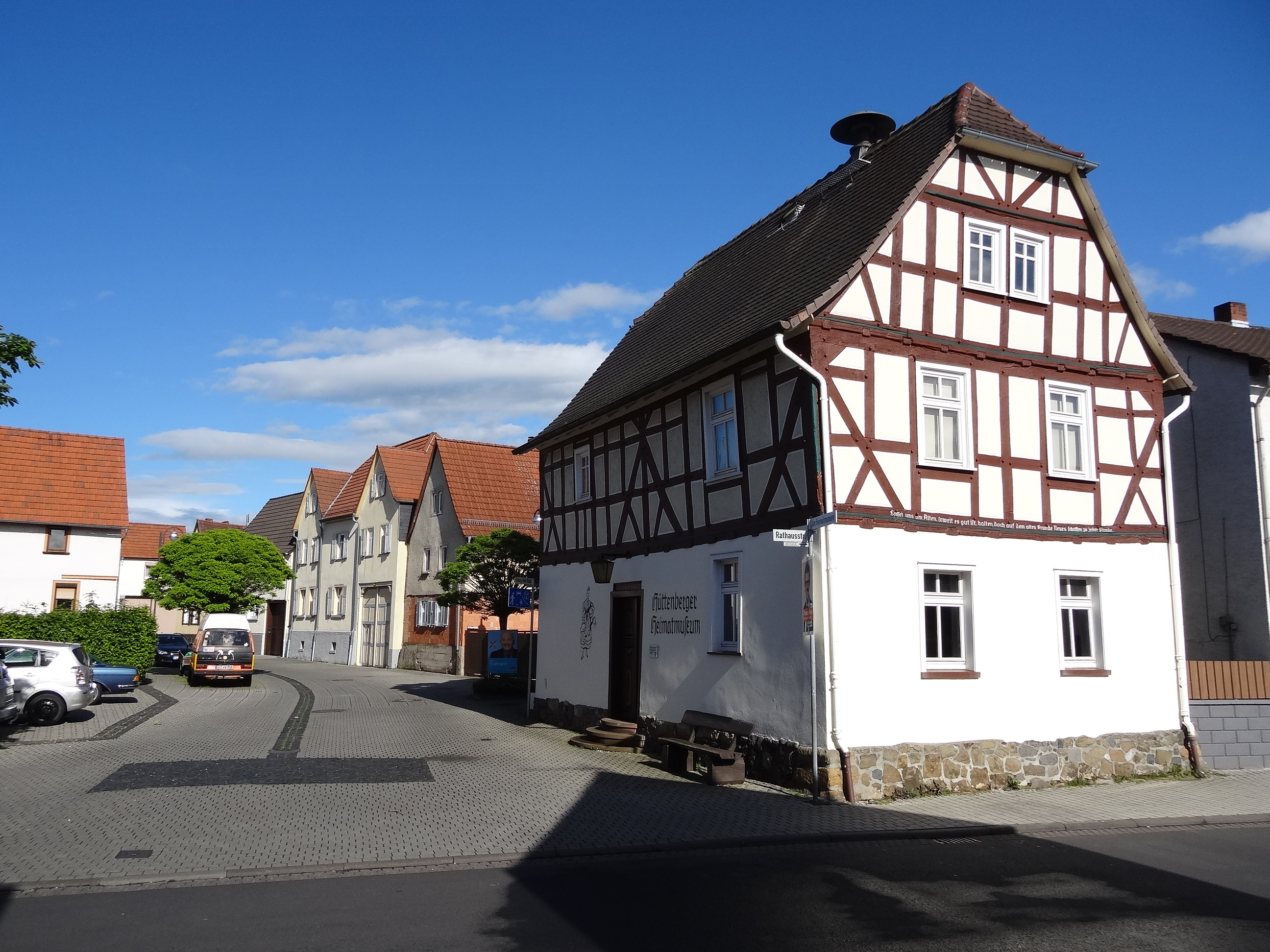 Am Heimatmuseum, Blick nach Osten